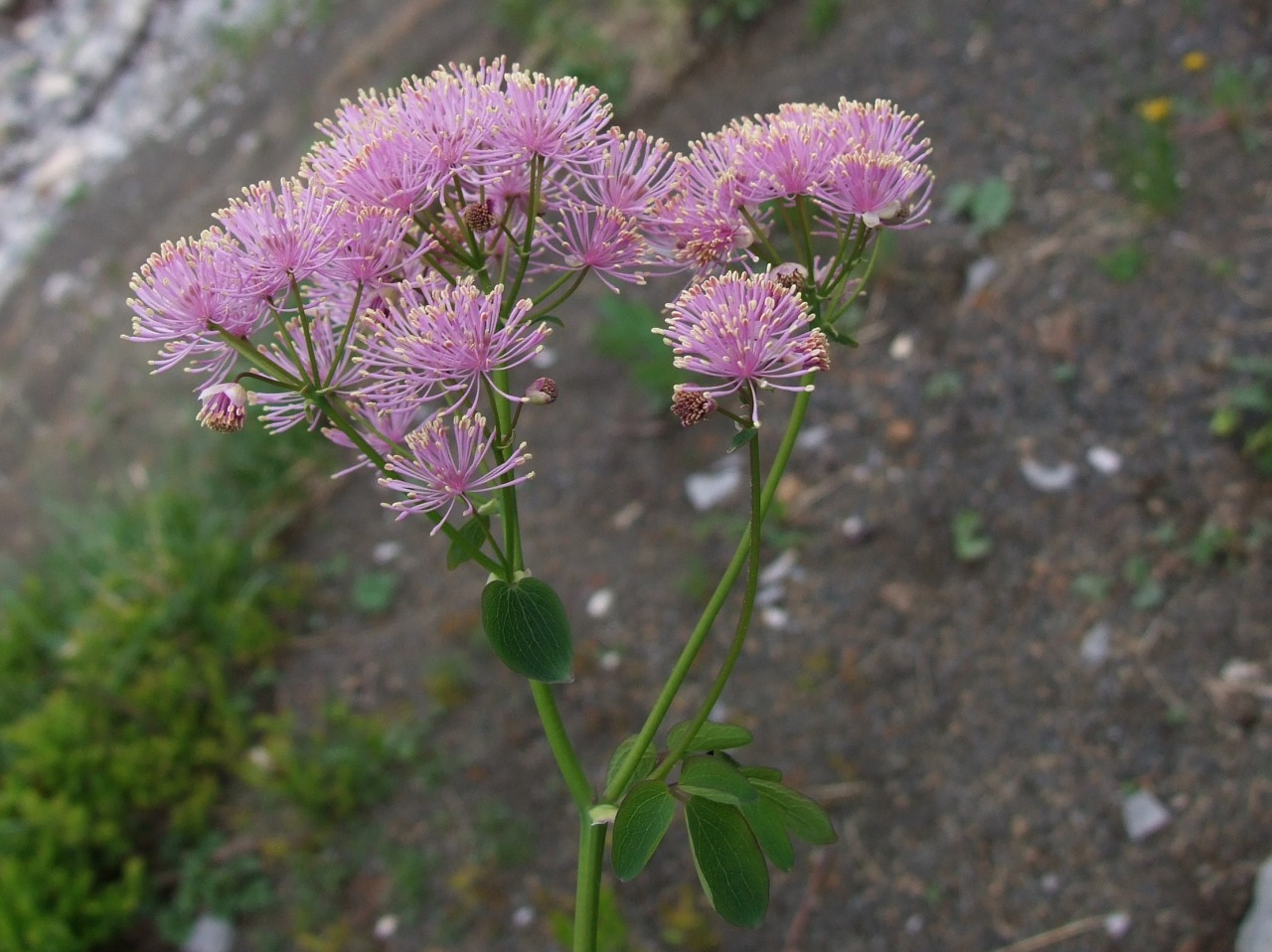 Thalictrum aquilegifolium